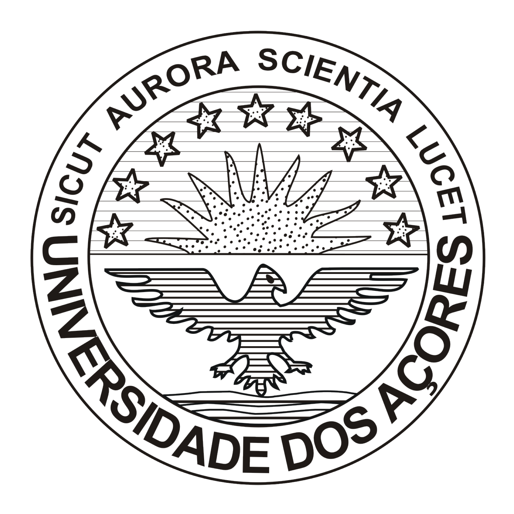 Logótipo da Universidade dos Açores (UAç)